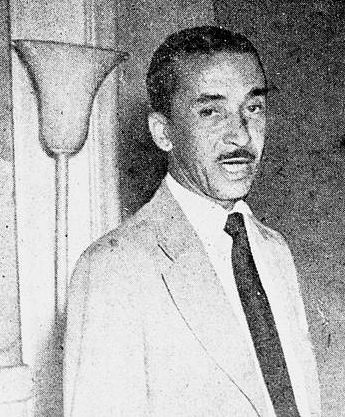 Fotografia